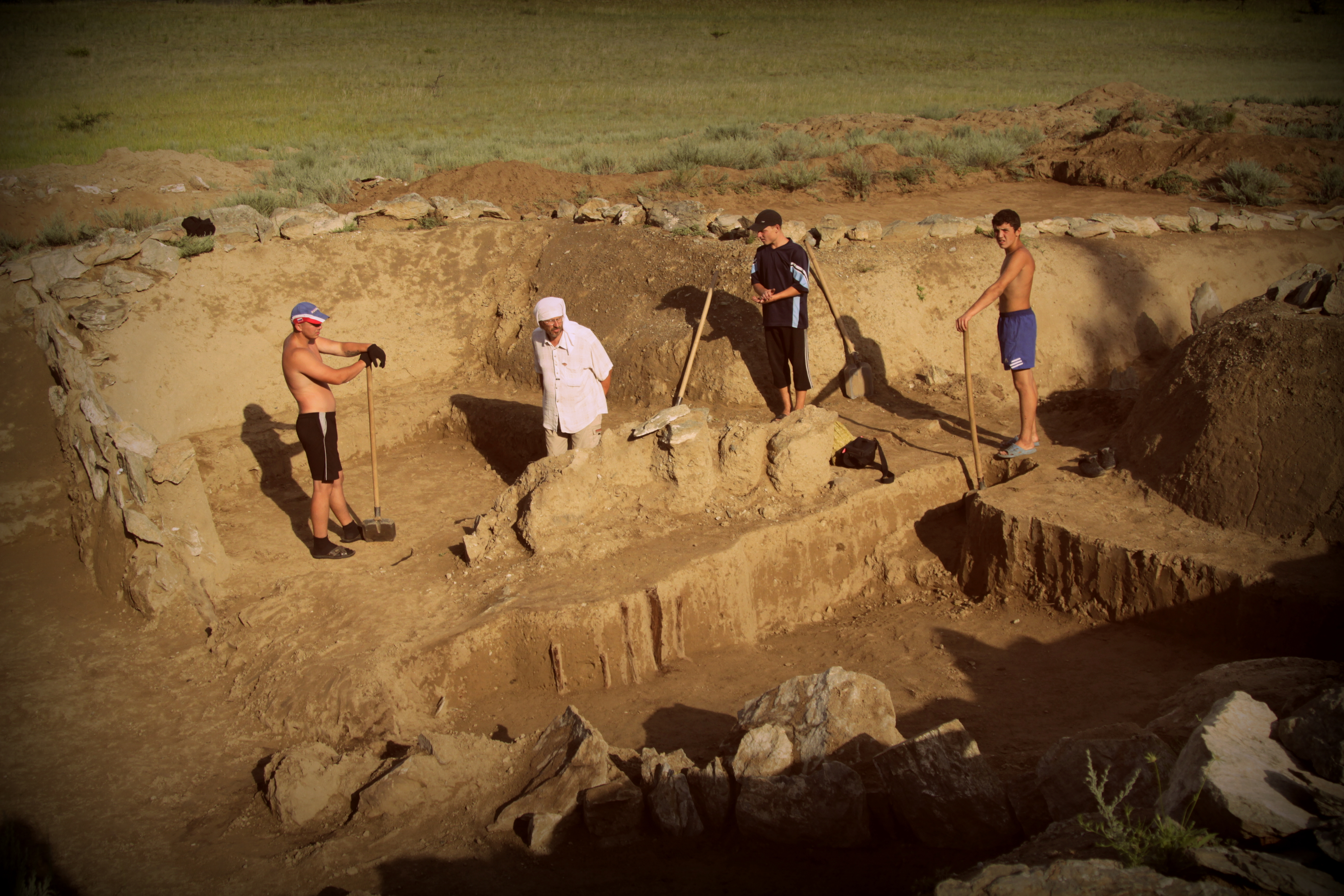 Четвертый полевой сезон проводят археологи Государственного Эрмитажа на раскопках хуннского могильника Оргойтон в Джидинском районе Бурятии.